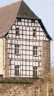 Burg Herrnstein in Ruppichteroth, Detail der östlichen Giebelwand